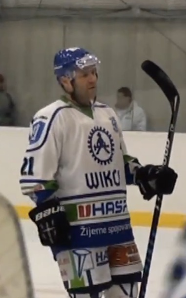 Jiří Hubáček (HC Hronov)